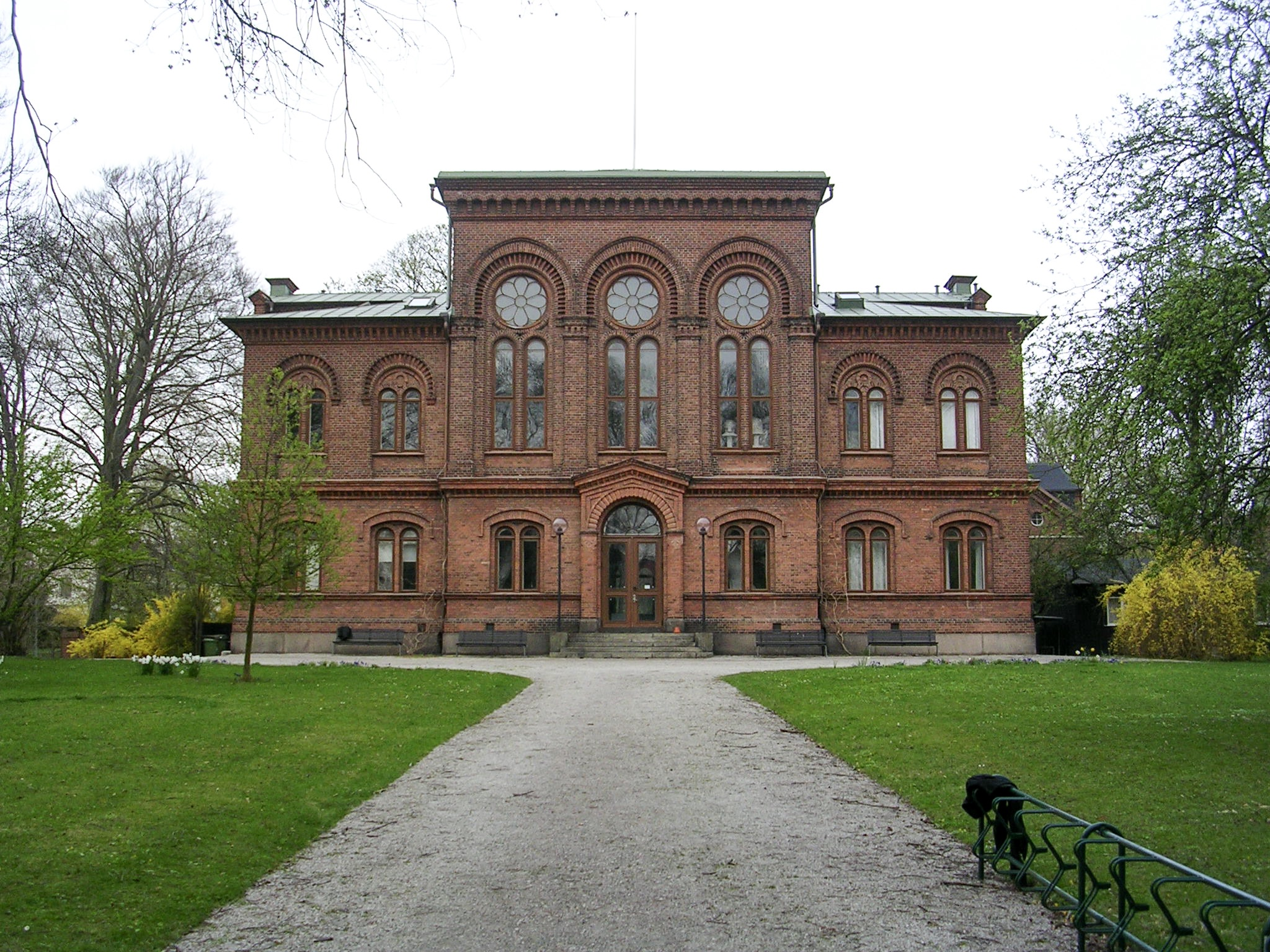 Classicum, byggnadsminnesmärkt hus i kvarteret Hyphoff i Lund, Skåne, Sverige.